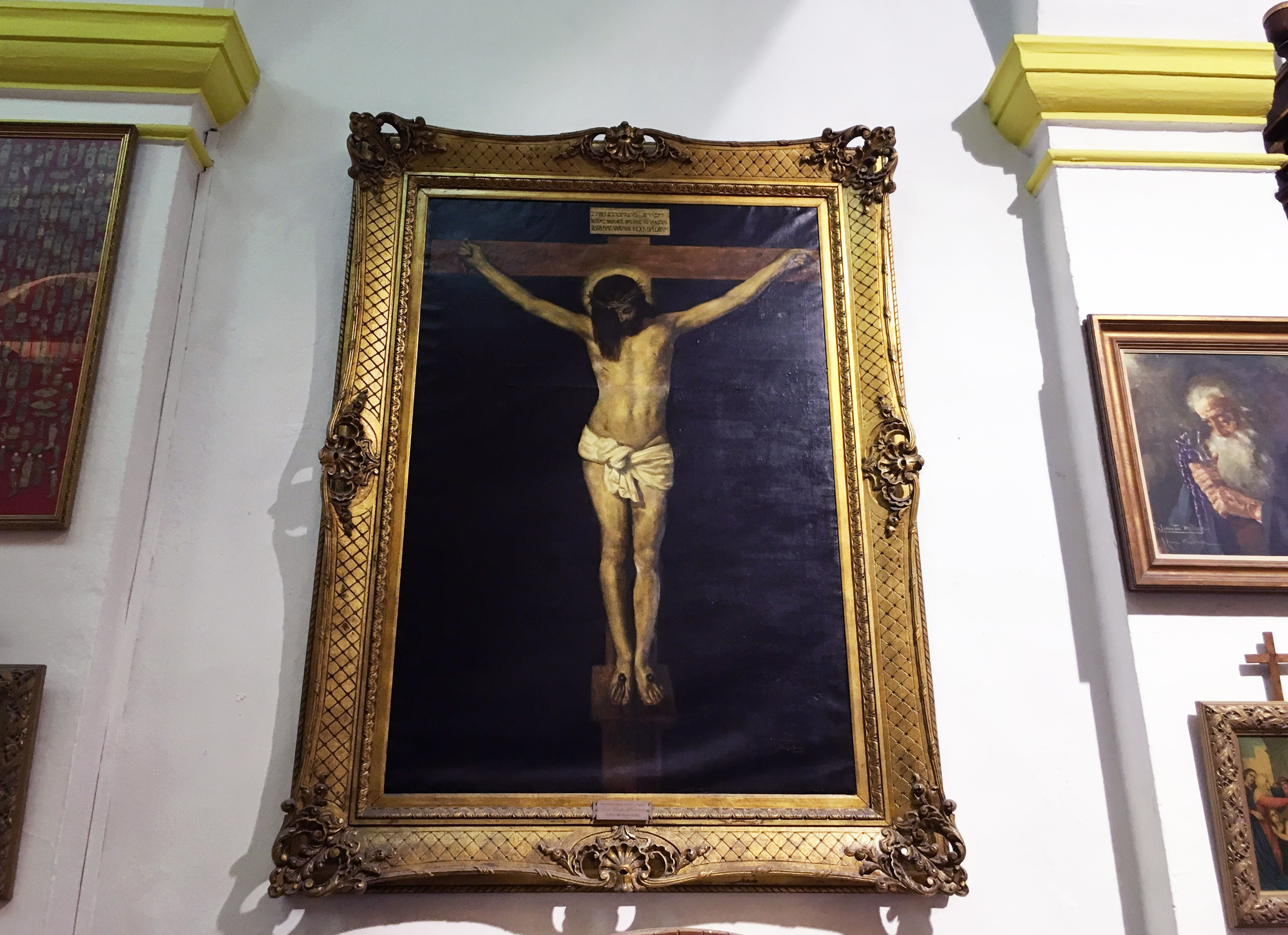 Copia del Cristo de Velázquez ubicado en la Parroquía de la Inmaculada de La Línea de la Concepción